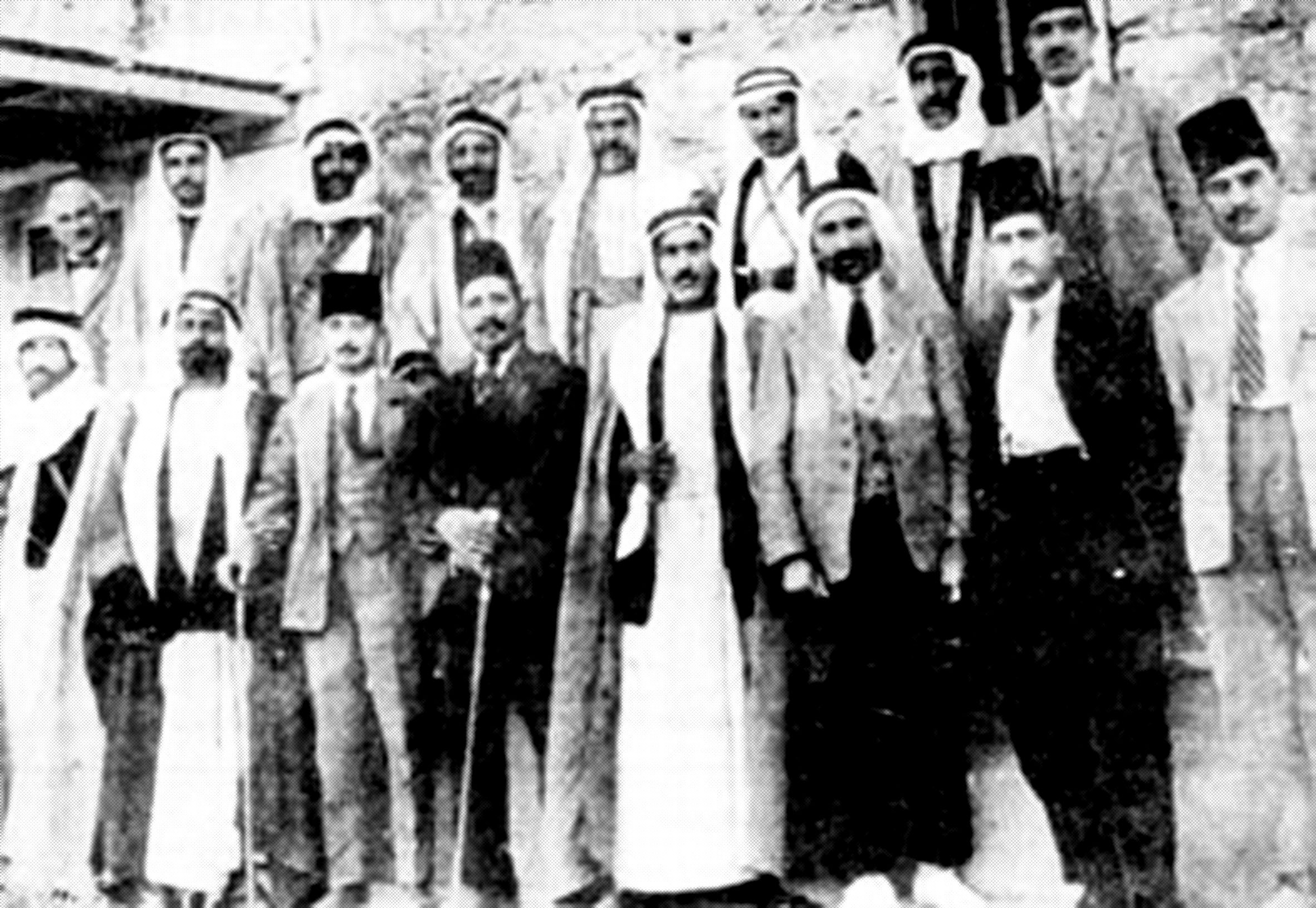 Jordan national conference 1930 المشاركة في المؤتمر الوطني الأردني المنعقد في مضافة تلول إربد و يظهر في الصف الأول من اليمين فرحان البيايضة والدكتور محمد حجازي وعبد القادر التل وعبد المهدي الشمايلة وعيسى المدانات وزعل المجالي و..الجبور وسلطي الإبراهيم أيوب. وفي الصف الثاني من اليمين: ناجي أبو نوار, حسين الطراونة, مثقال الفايز, راشد الخزاعي, سليمان بن طريف, حديثه الخريشه, سالم الهنداوي, شمس الدين سامي الشركسي